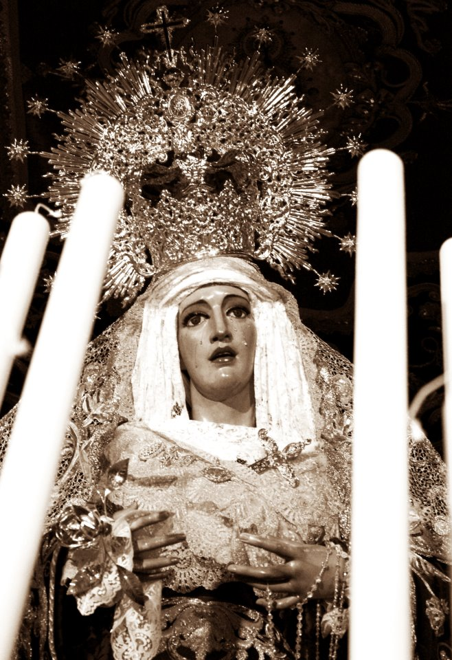 Maria Santisima del Dulce Nombre en su Soledad